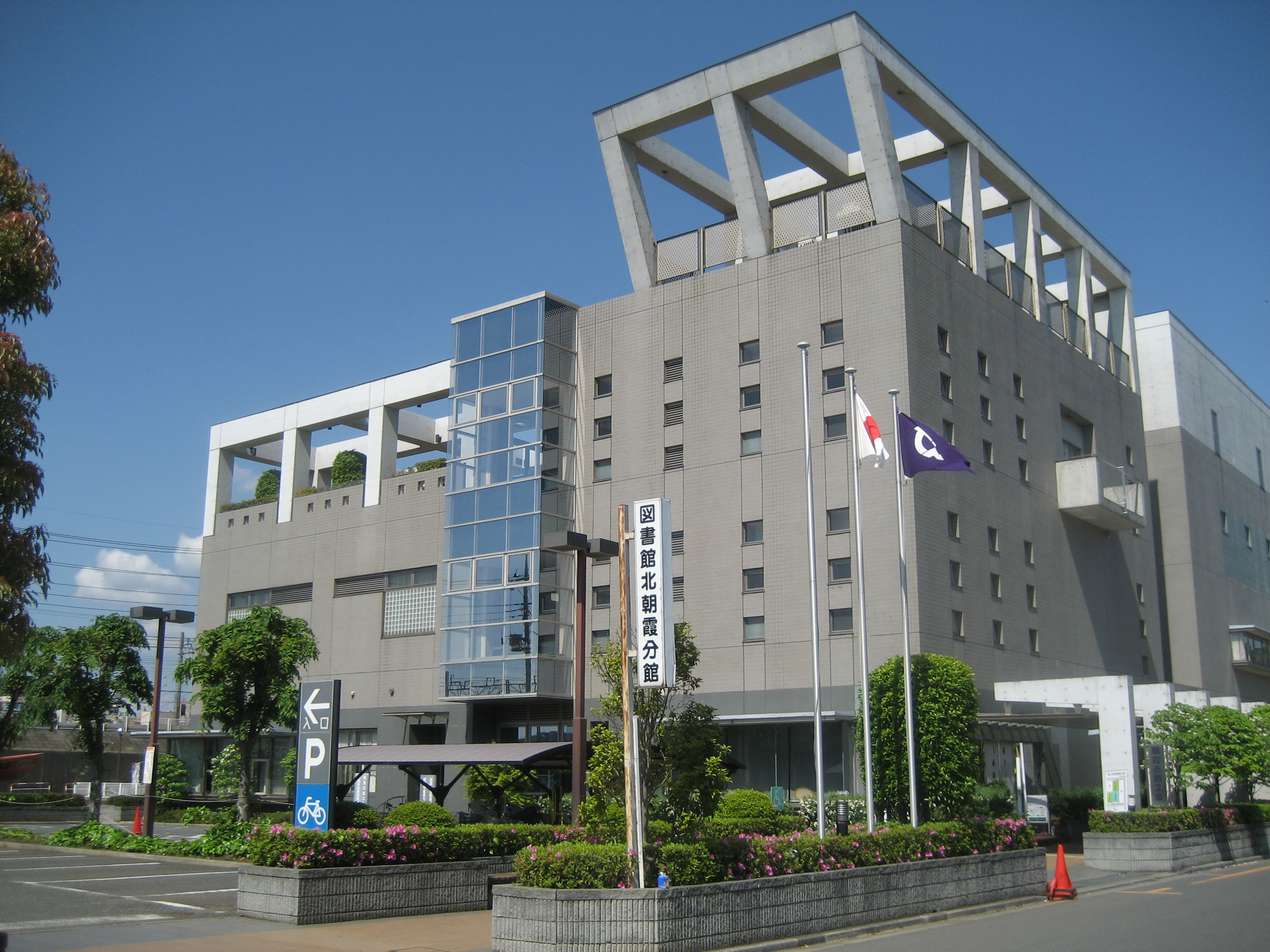 朝霞市産業文化センター・朝霞市立図書館北分館